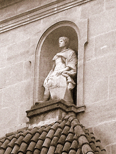 Imatge de Sant Jordi de Peresejo